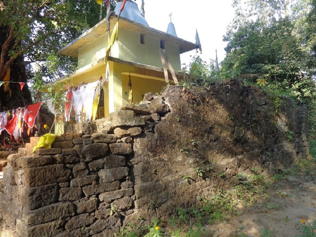 नेपाल भाषा: Siddanath Mandit